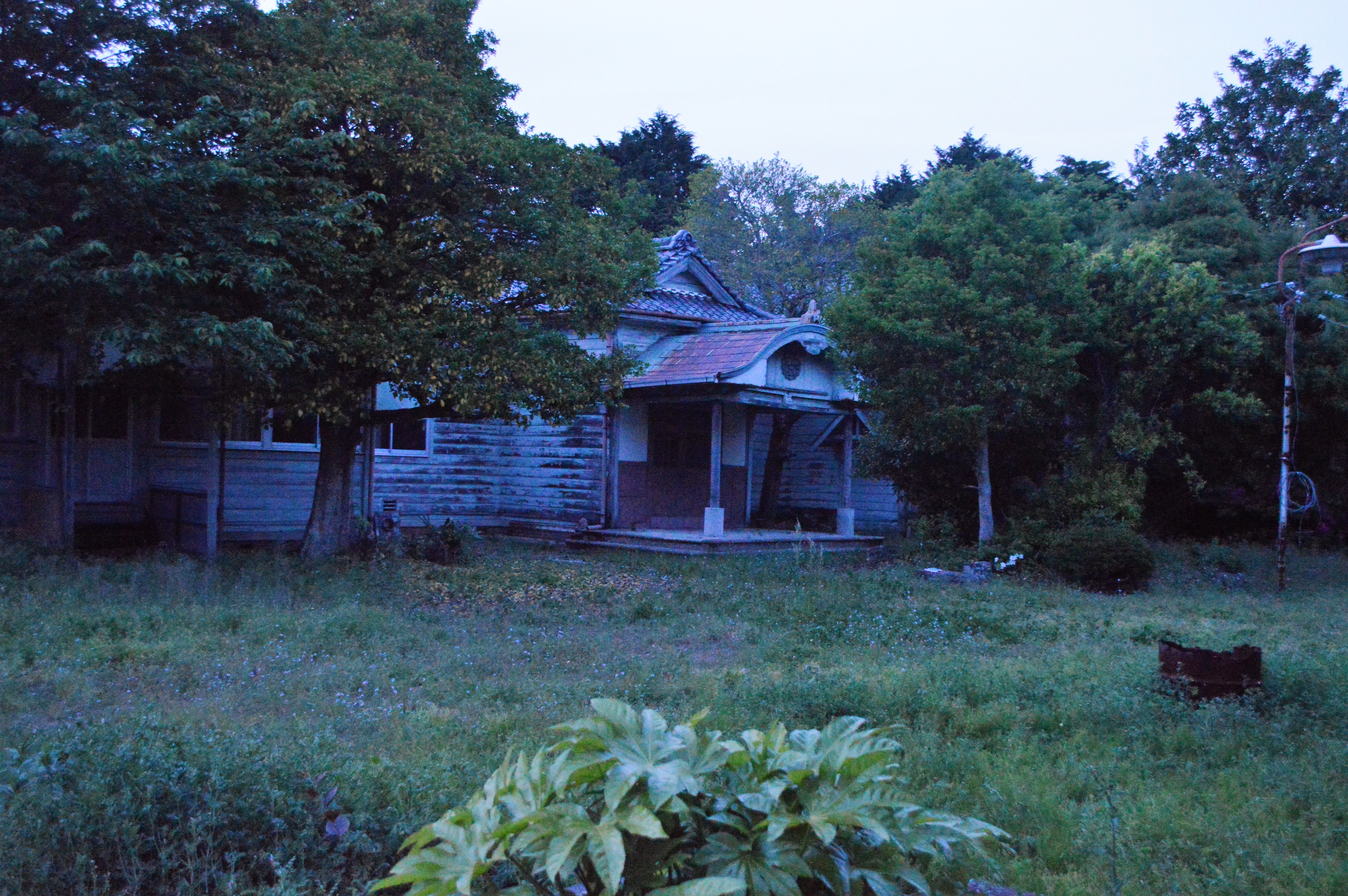 愛知県江南市東野町河原にある瀧会館。1915年から1927年まで、私設図書館の瀧文庫として使用された。